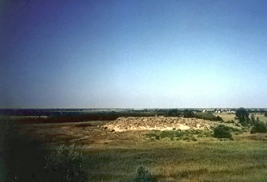 Kamyana Mohyla, yacimiento arqueológico en Ucrania